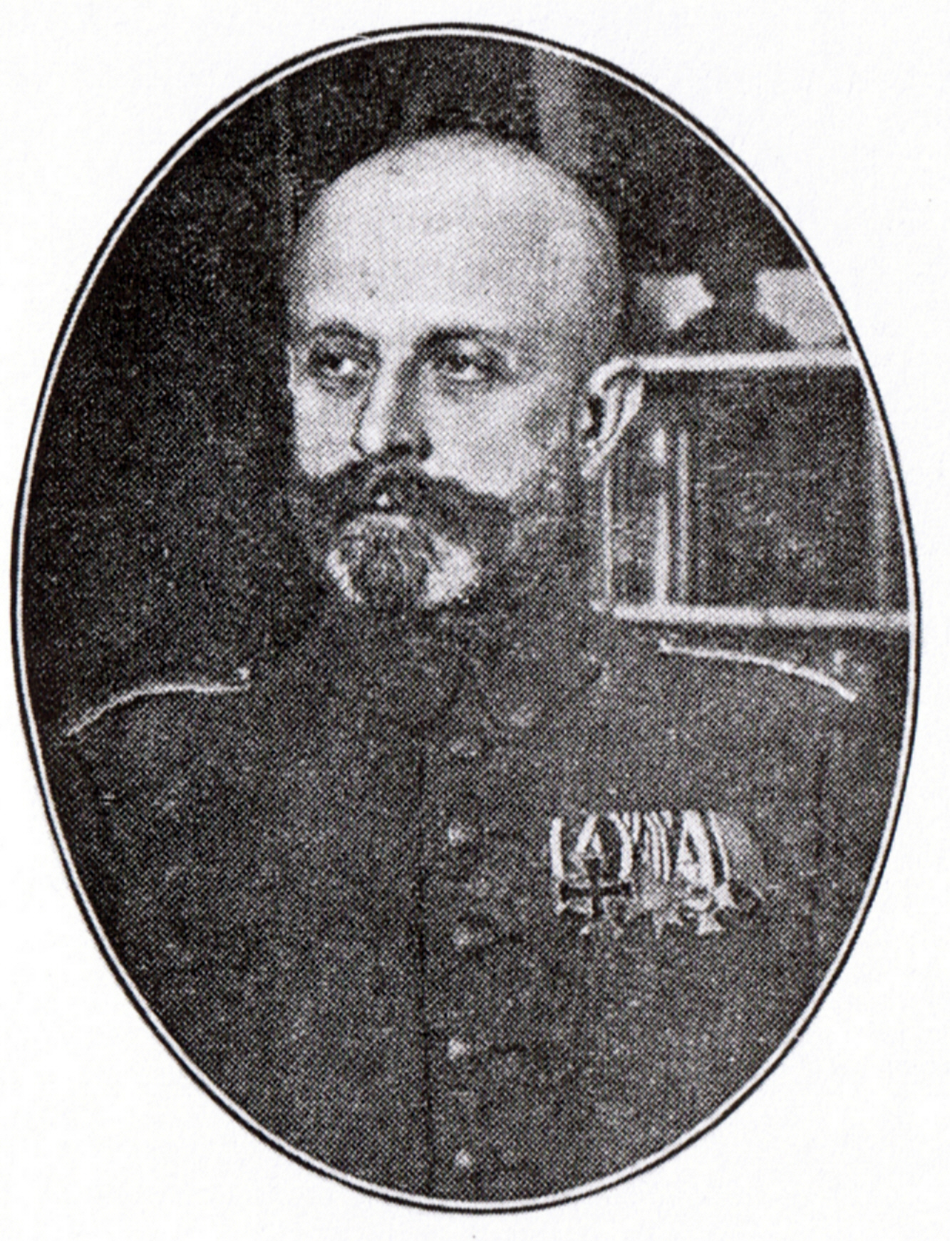 Eduard Clausnitzer (1870-1920) war ein deutscher Theologe, Pädagoge und Schriftsteller in Uetersen.